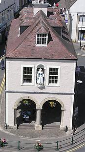 Dursley Market